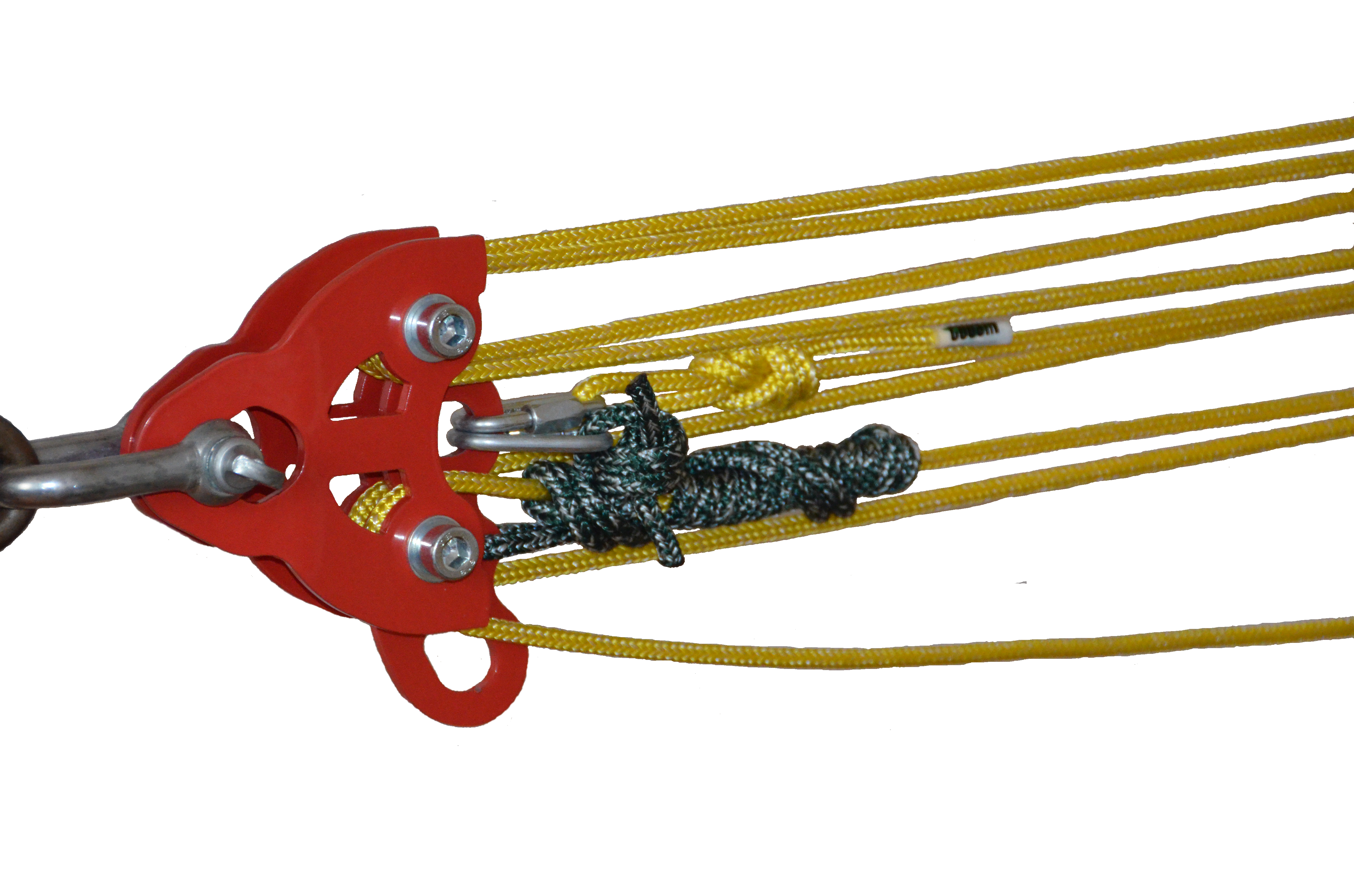 Mouflage type "Slackimoufle" utilisant un noeud de knut